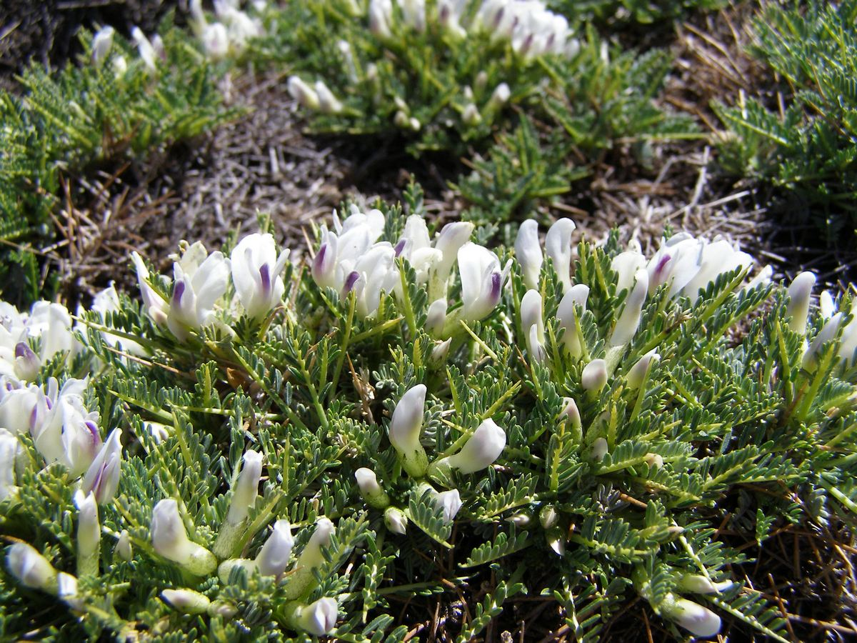 Blühender Kugelbusch (Astragalus angustifolius, eine Tragant-Art) in 2.200 m Höhe, Psiloritis, Kreta